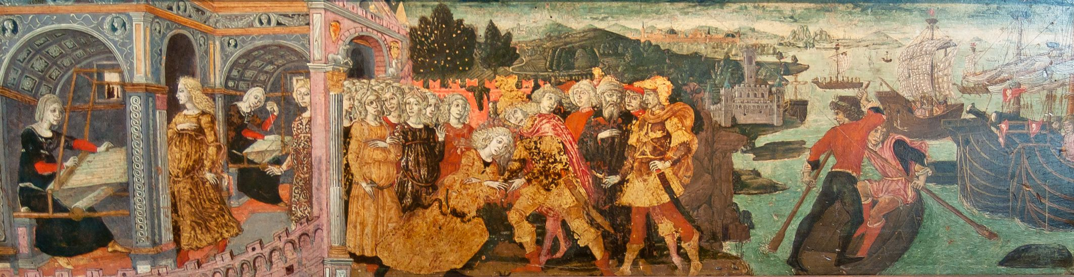 Guidoccio Cozzarelli : le départ d'Ulysse. Panneau de coffre, collection Campana. Musée National de la Renaissance, château d'écouen.